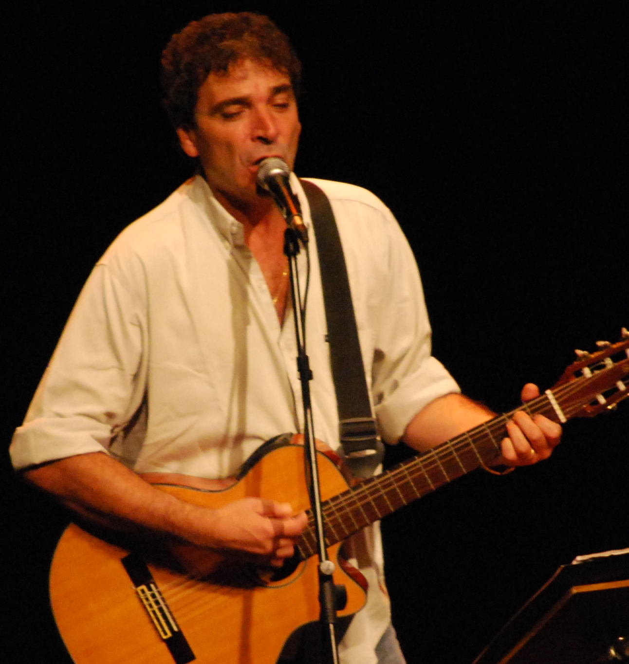 El cantautor argentino Ignacio Copani en su recital "Veinte años" el día 22 de mayo de 2009, en la Sala Zitarrosa (Uruguay).